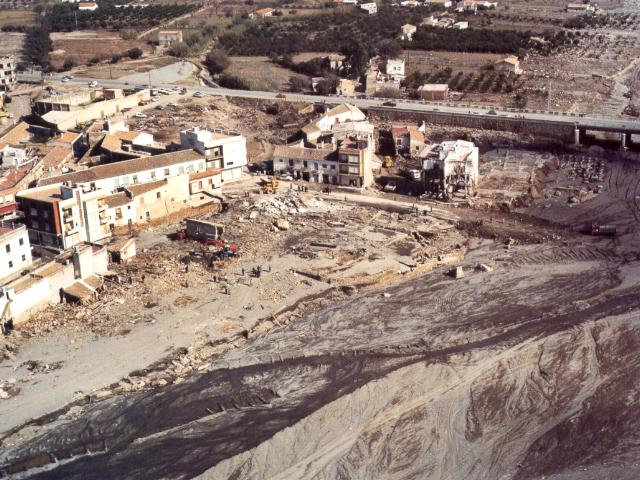 Vista de la Rambla de Nogalte tras la ríada de 1973